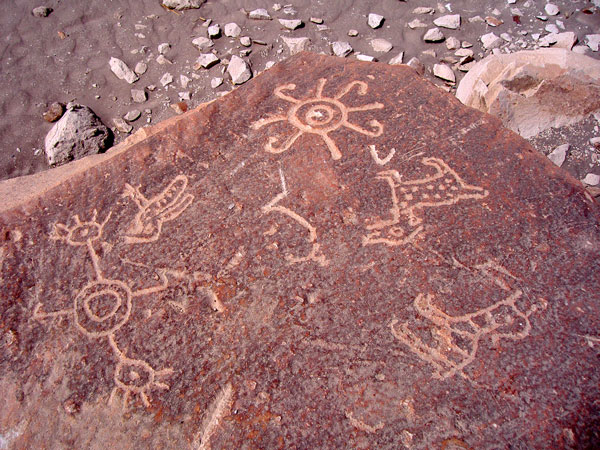 Petroglifos de Toro Muerfto en la provincia de Castilla, Arequipa.